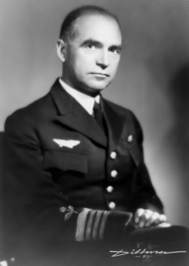 Porträttfotografi av Hugo Svenow, chef för Roslagens flygflottilj (F 2) åren 1944-1948, Blekinge flygflottilj (F 17) åren 1948-1951 och Norrbottens flygbaskår (F 21) åren 1951-1957.